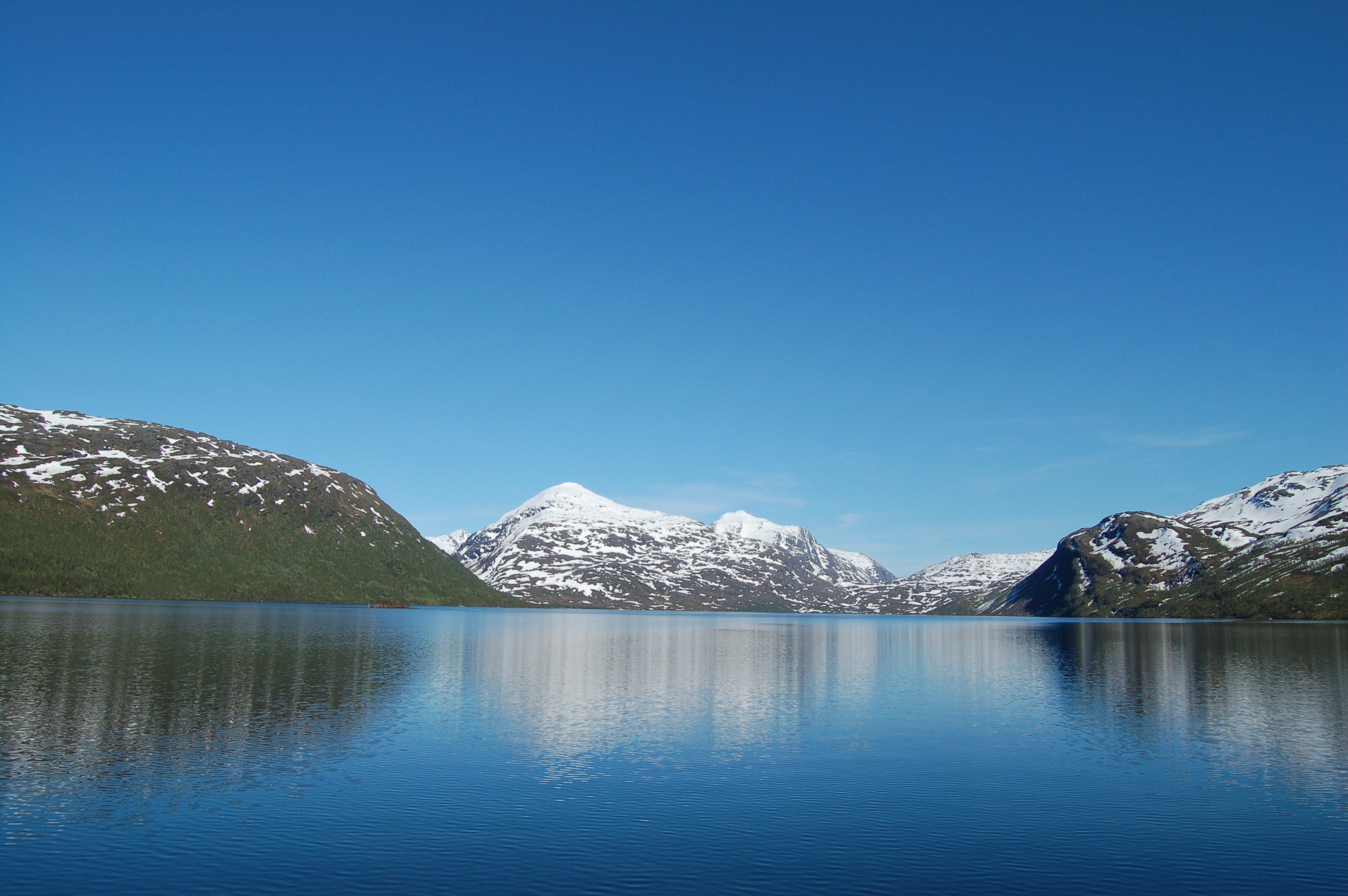 Bleikvatnet i Nordland